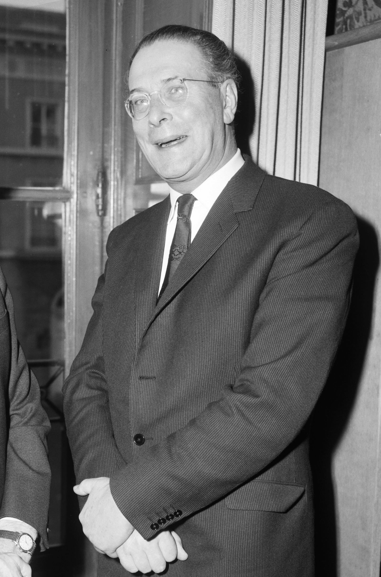 Britse TV-directeur Kenneth Adam in Den Haag , links dr. ir. W.Th. Bahlen